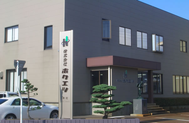 株式会社ホクエツ 本社外観（新潟県燕市）